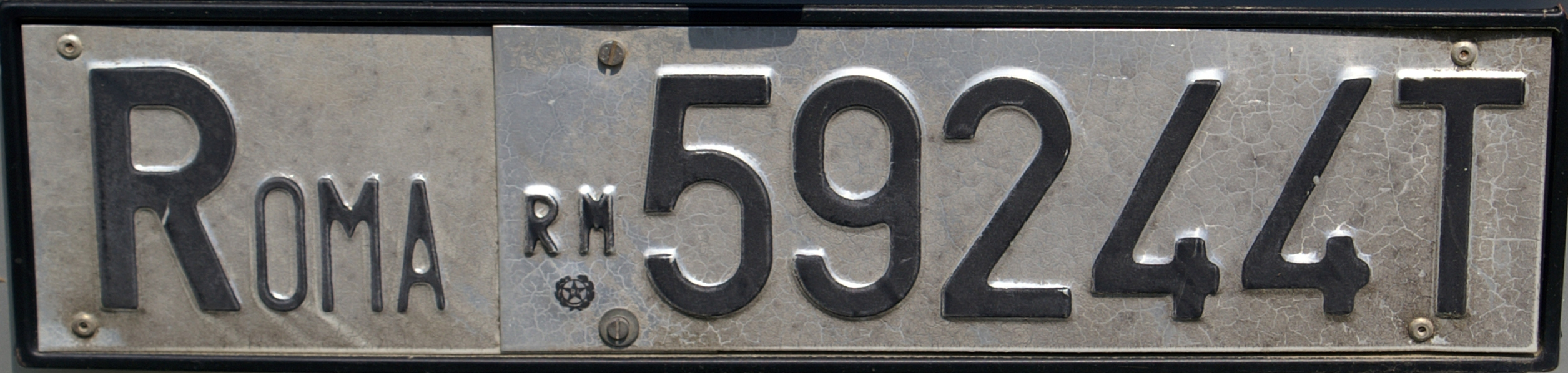 Italy licenseplate Roma